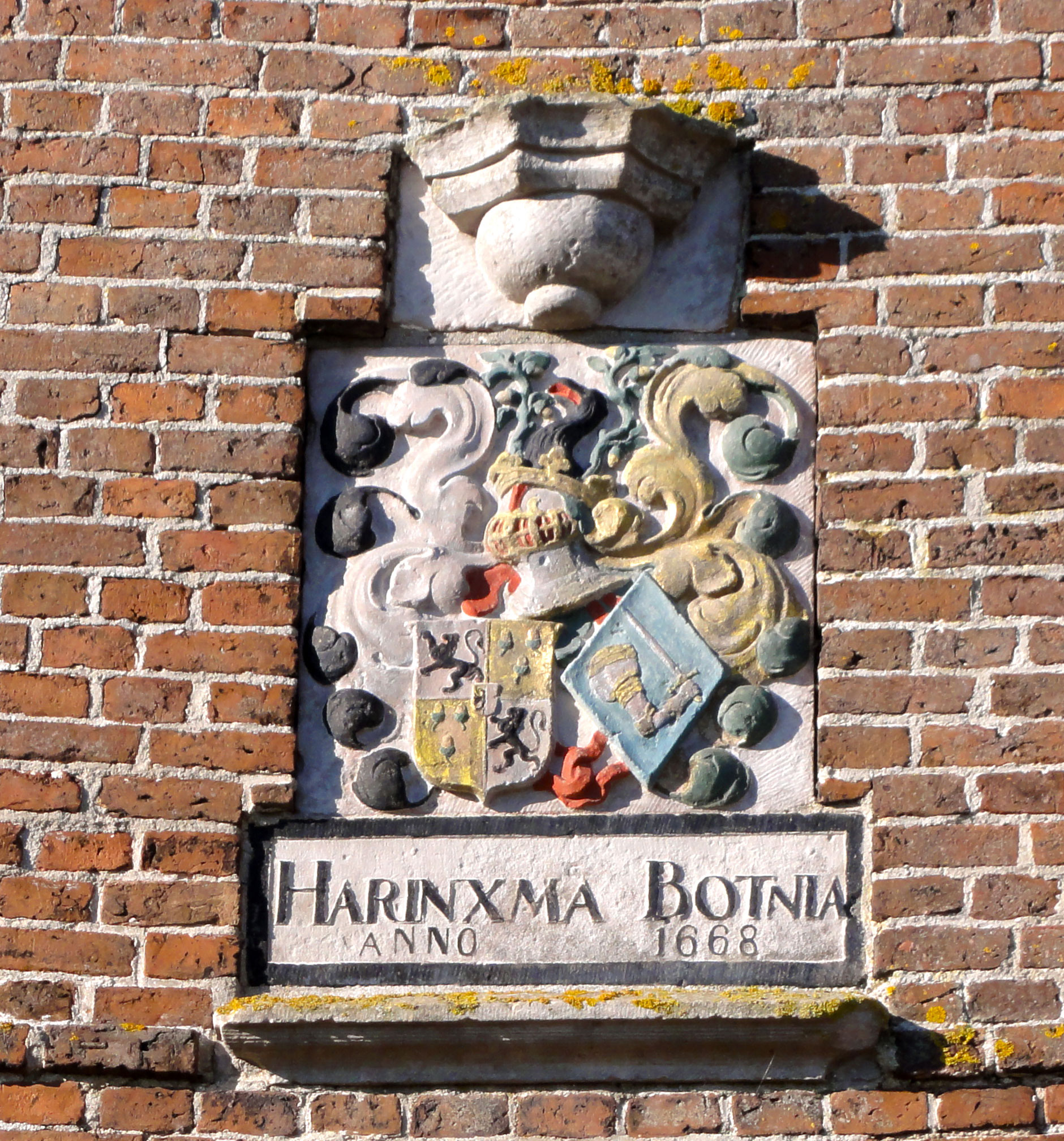 Poortgebouw Sjucksmastate in Waaxens, rijksmonument